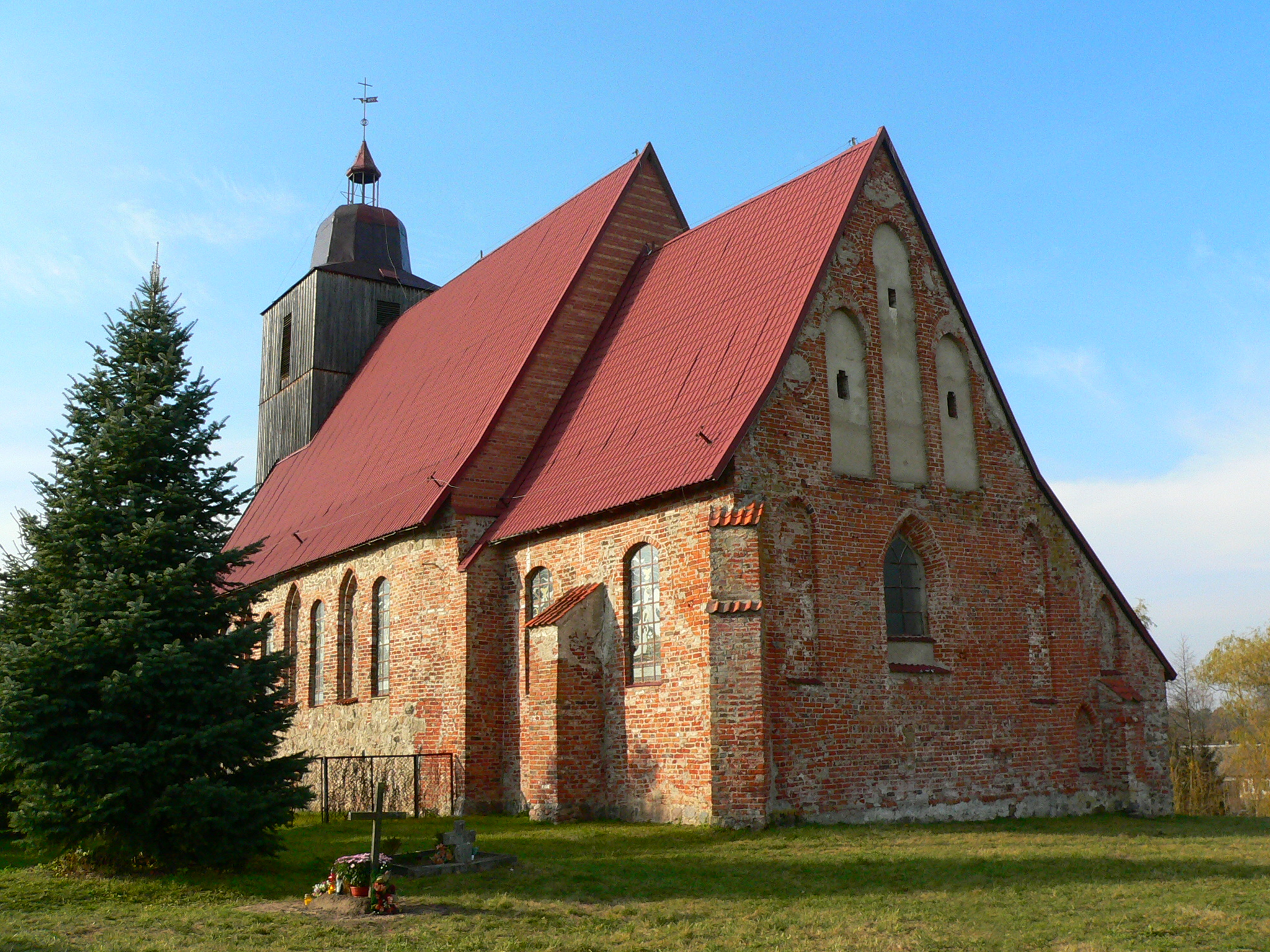 Żelazna Góra - kościół p.w. Świętej Rodziny (zabytek nr rejestr. A-655)